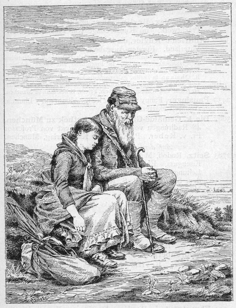 Wandernder Musikant